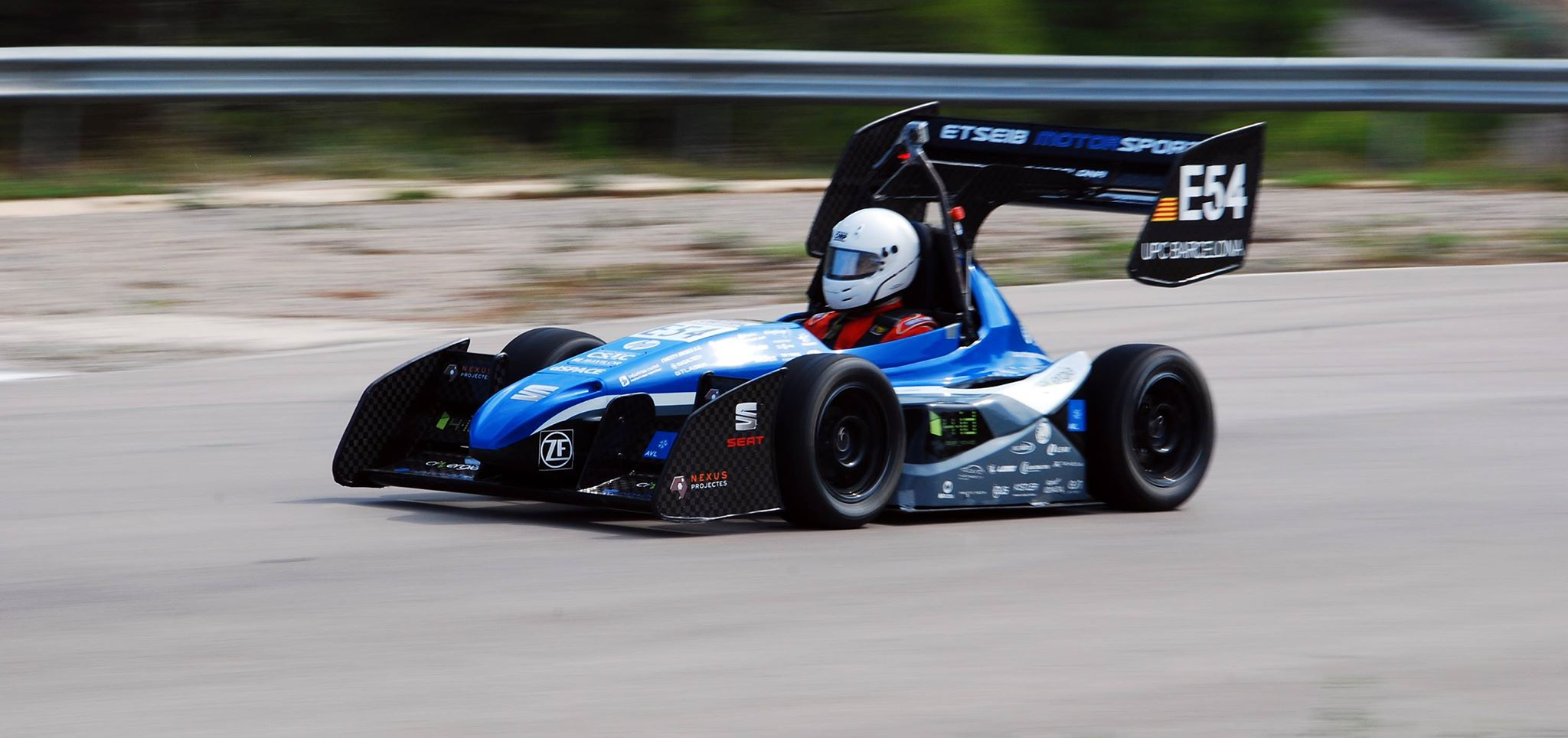 Fotografia del coche CAT07e en el dia de preubas que realizo el equipo en el circuito corto de Castelloli